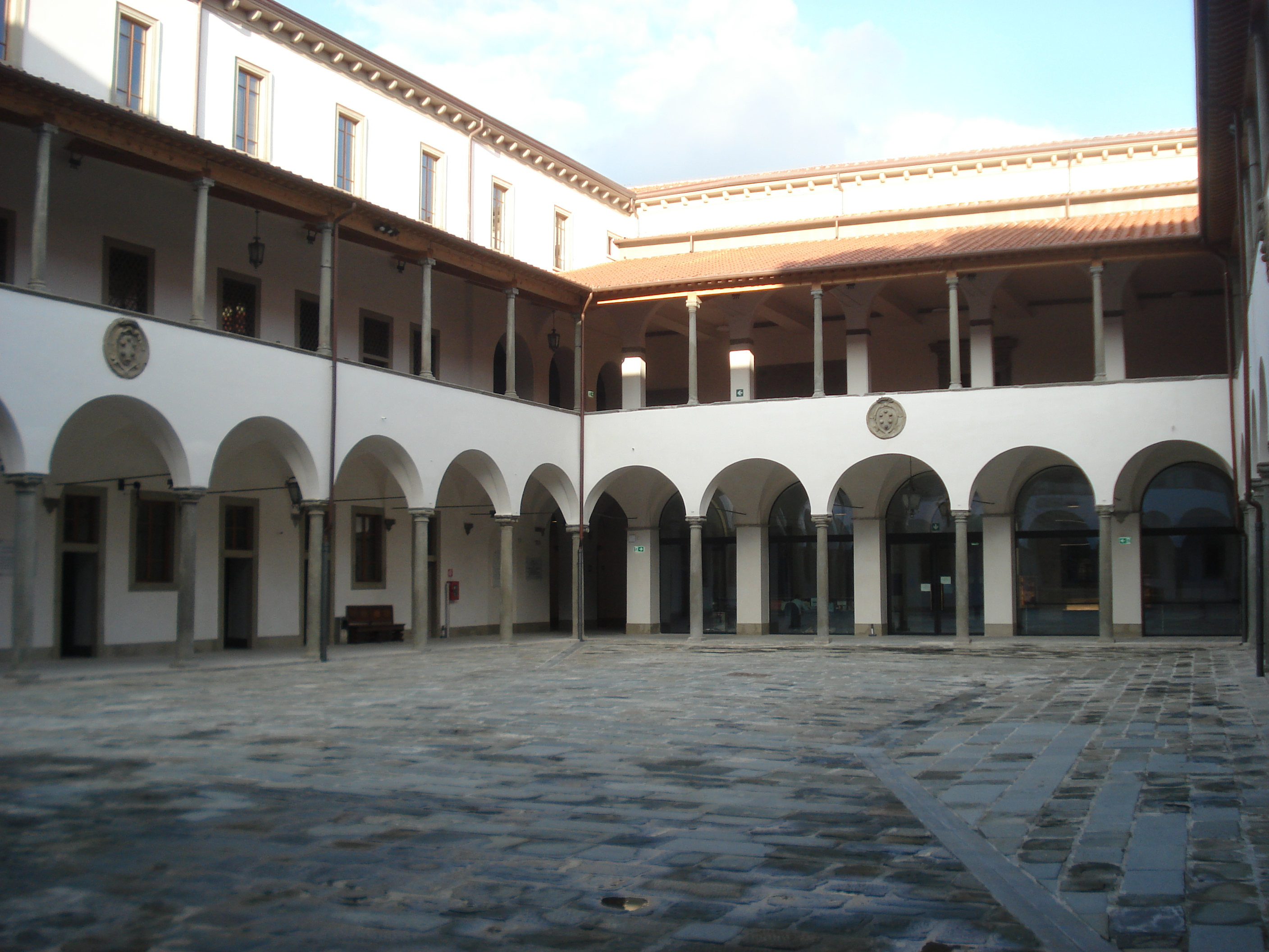 Chiostro interno del Palazzo della Sapienza, a Pisa, nel 2019, dopo l'intervento di restauro conclusosi nel 2018. This is a photo of a monument which is part of cultural heritage of Italy.